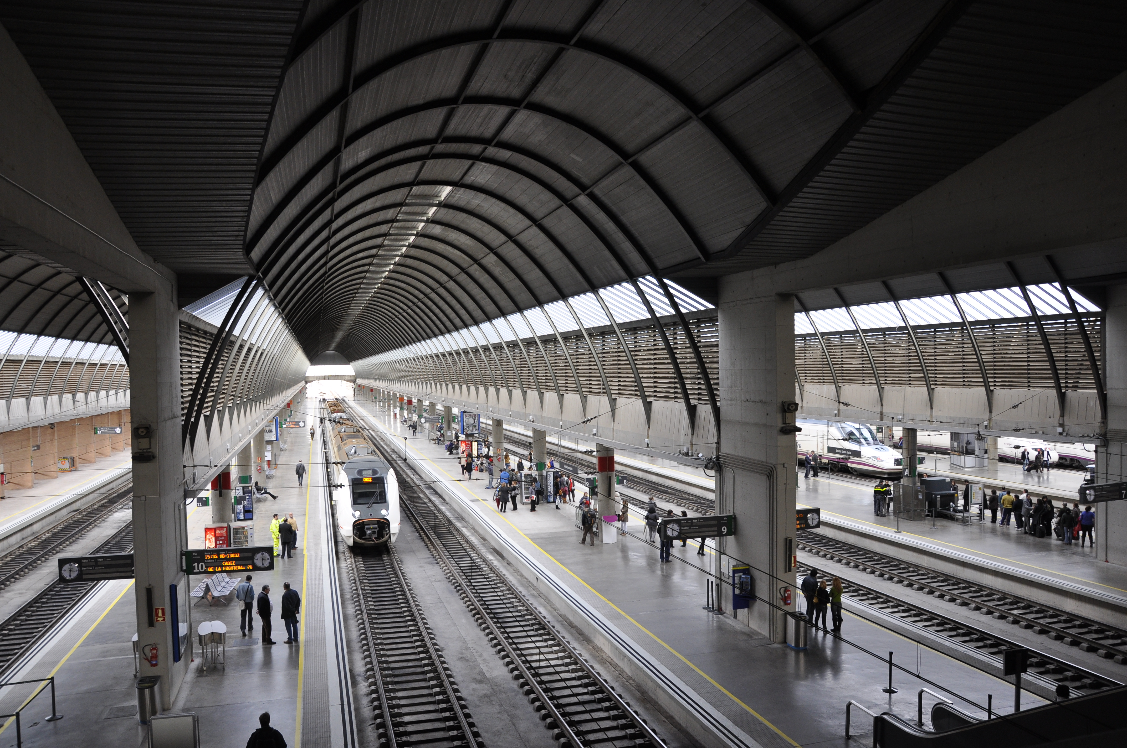 Perrons van het station Sevilla - Santa Justa